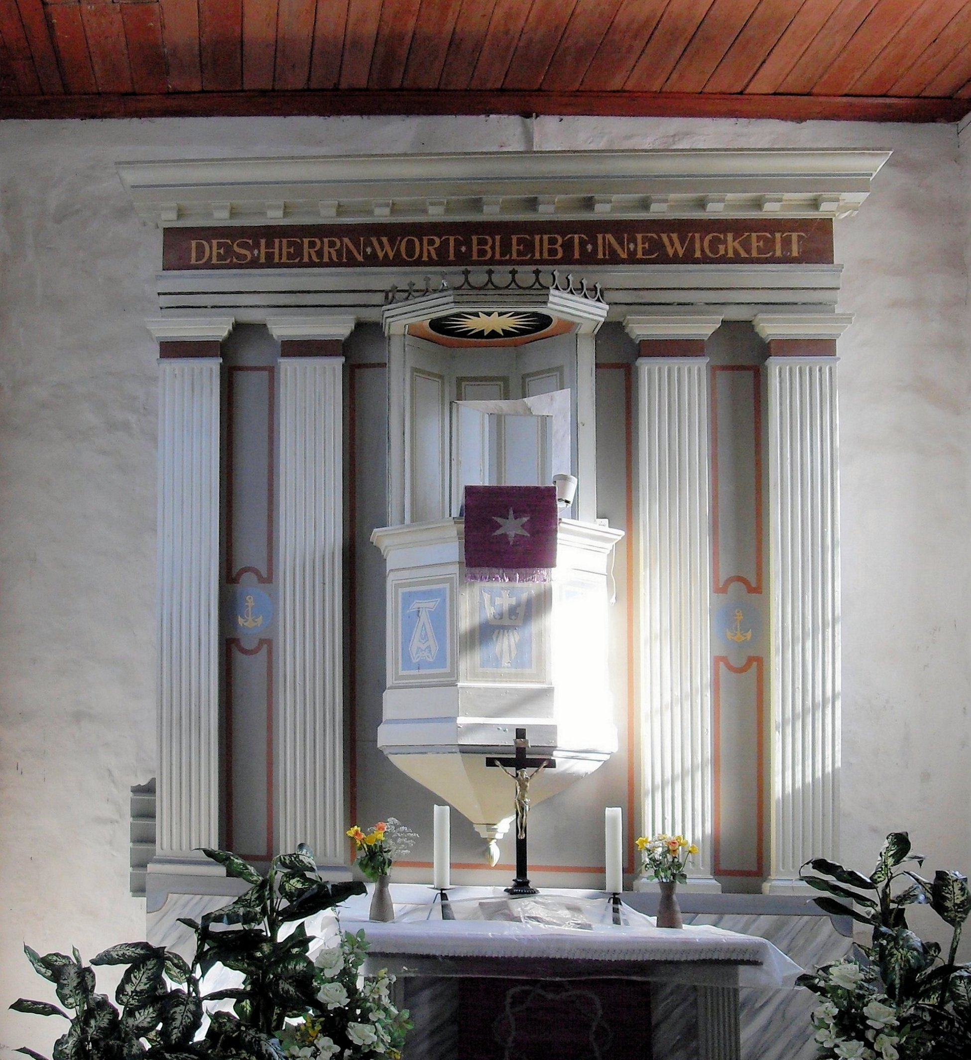 Kanzelaltar der Dorfkirche Marxdorf, Gemeinde Vierlinden, Deutschland